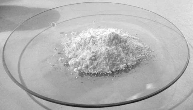 BaCO3